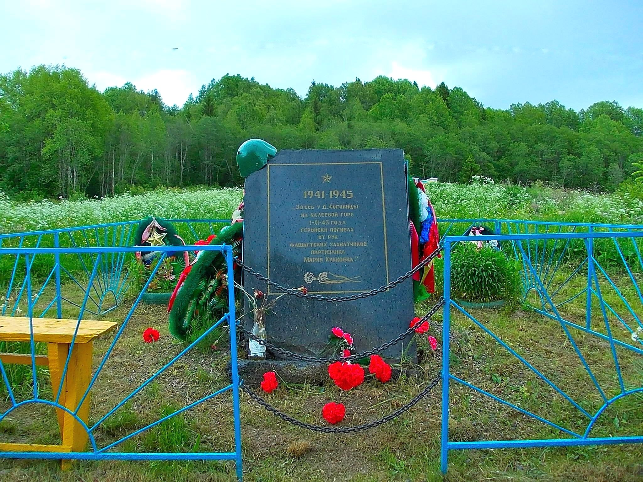 Памятник партизанке Марии Куккоевой